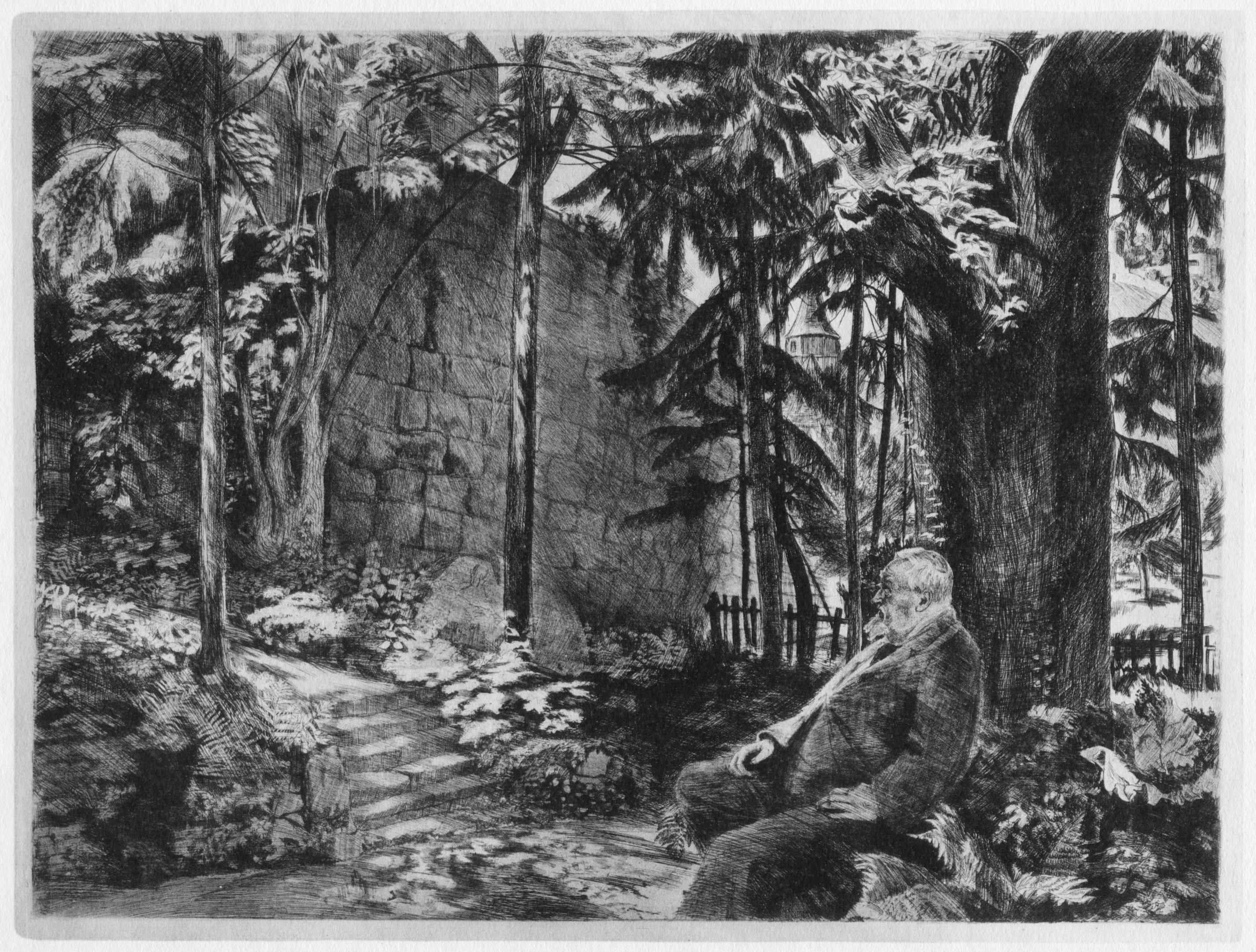 Ehrenbürgerbrief der Stadt Weinsberg für Hofrat Theobald Kerner. Theobald Kerner im Alter von 80 Jahren im Garten des Kernerhauses in Weinsberg, links ein Teil der Stadtmauer mit dem Geisterturm, rechts hinter den Bäumen die Weinsberger Johanneskirche und die Burgruine Weibertreu. Op. 45,2 im Katalog der Radierungen. Strichätzung und Roulette, Plattengröße 365×480 mm